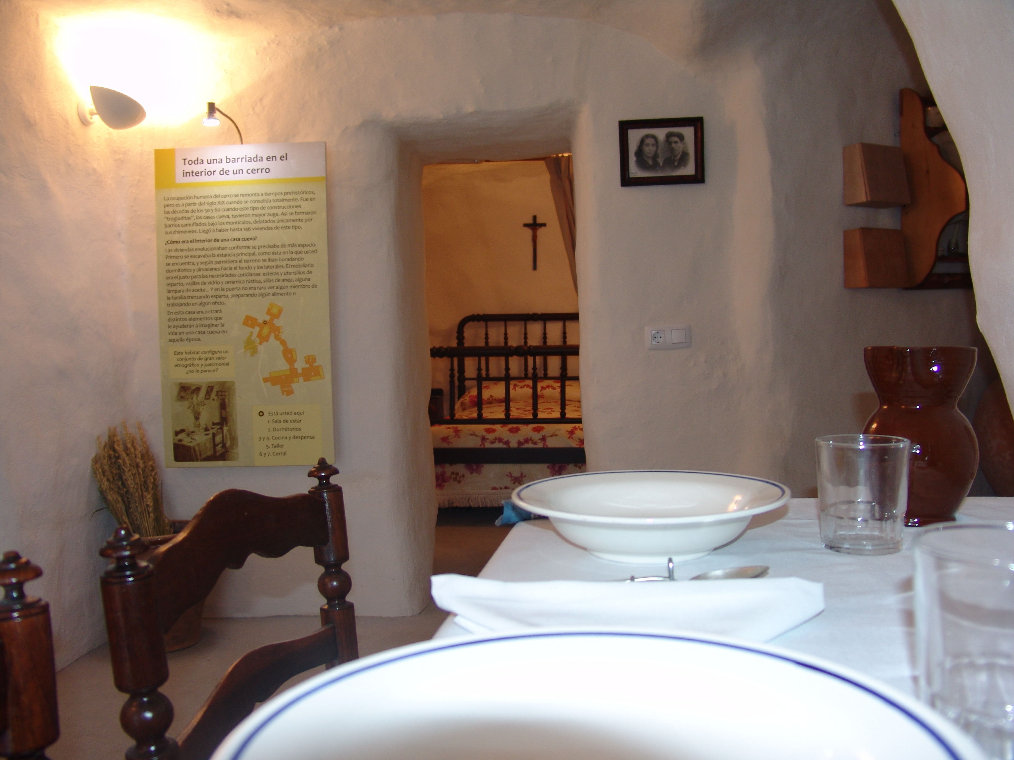 Detalle del interior de la cueva dedicada a explicar la vida y tradiciones en las Casas Cueva del Cerro del Castelalr